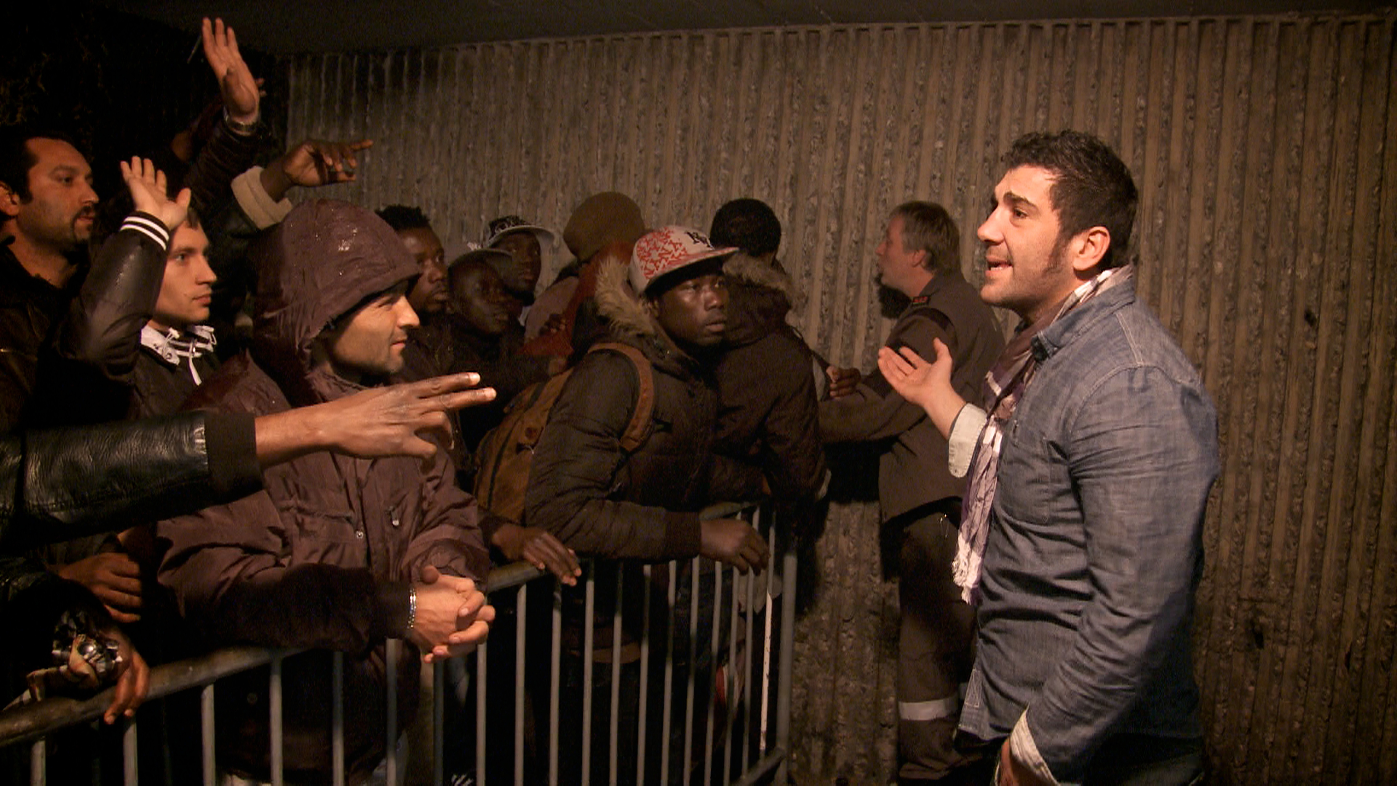 Le veilleur José ne sait plus qui choisir. Image tirée du film « L’abri » de Fernand Melgar